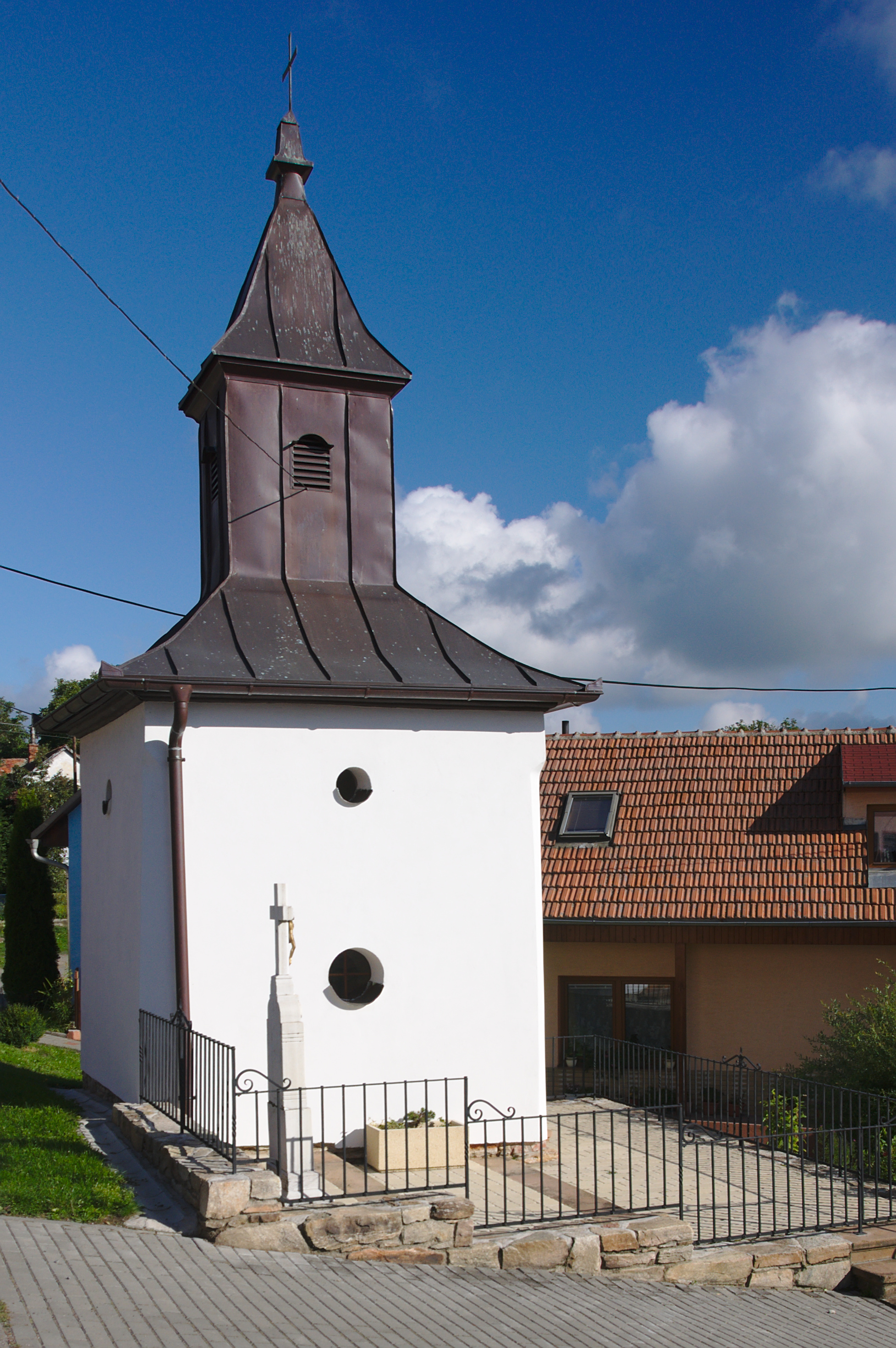 Kaple, Lhota u Lysic, okres Blansko